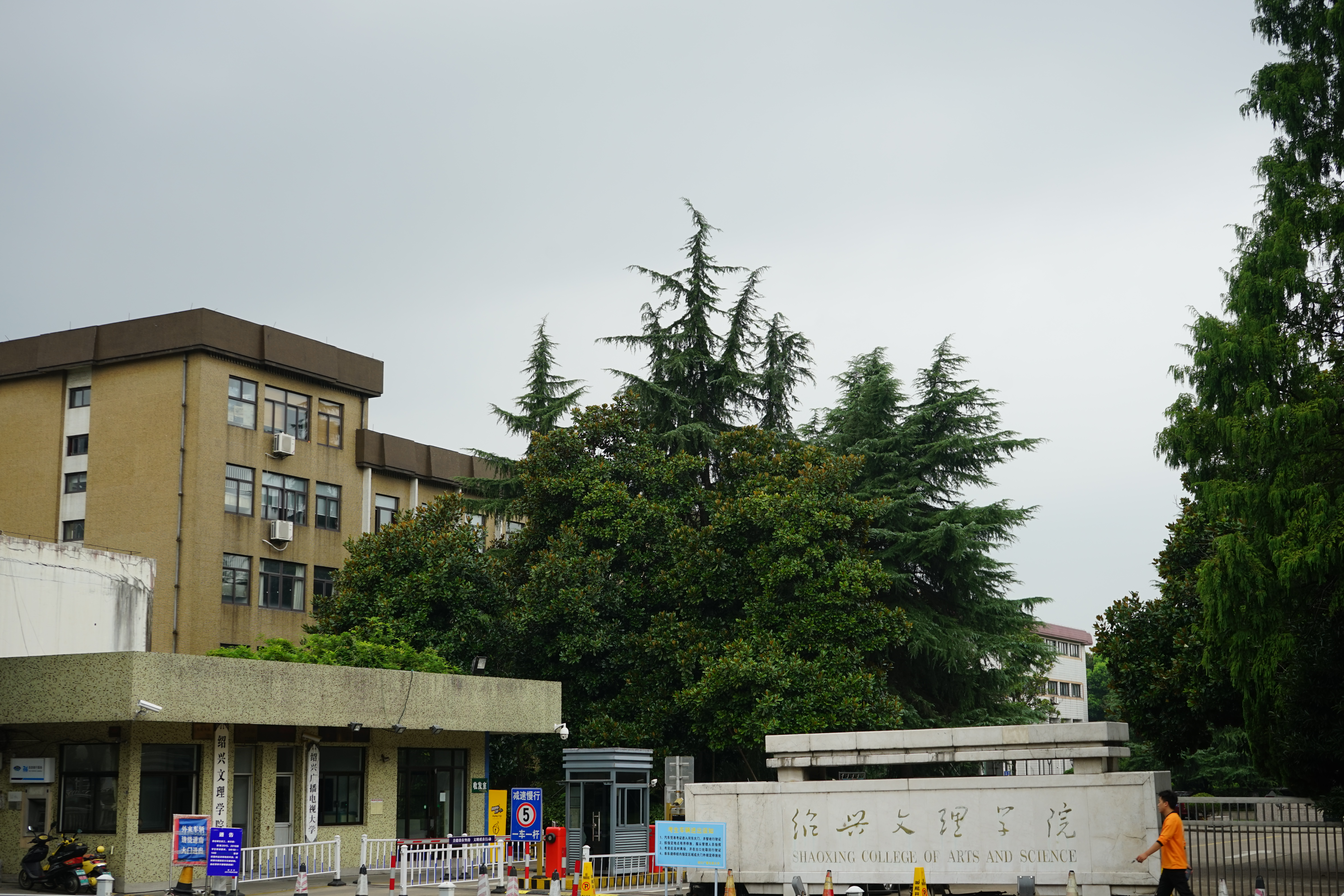 绍兴文理学院河东校区校门